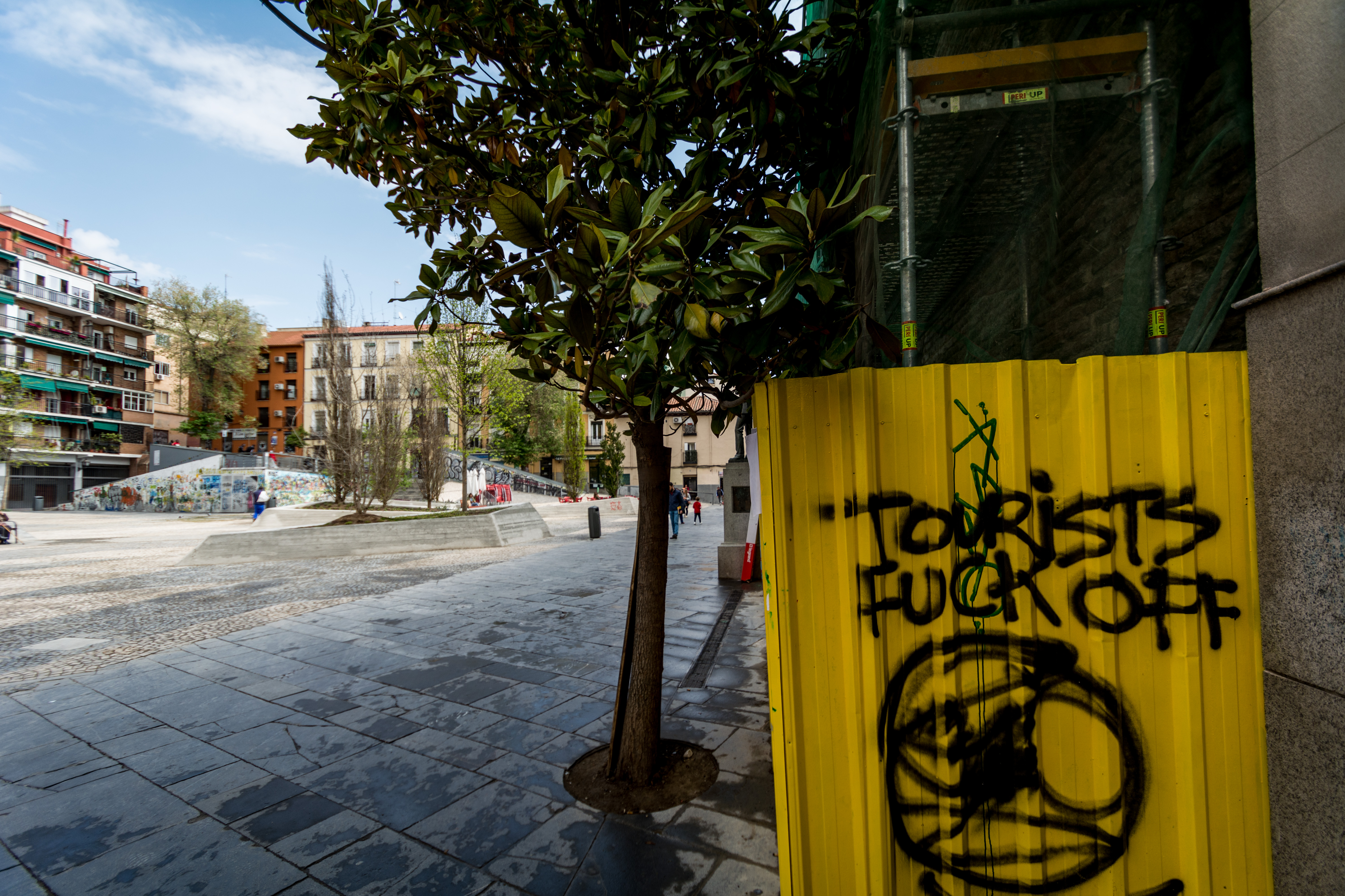 Plaza de Agustín Lara (Madrid).